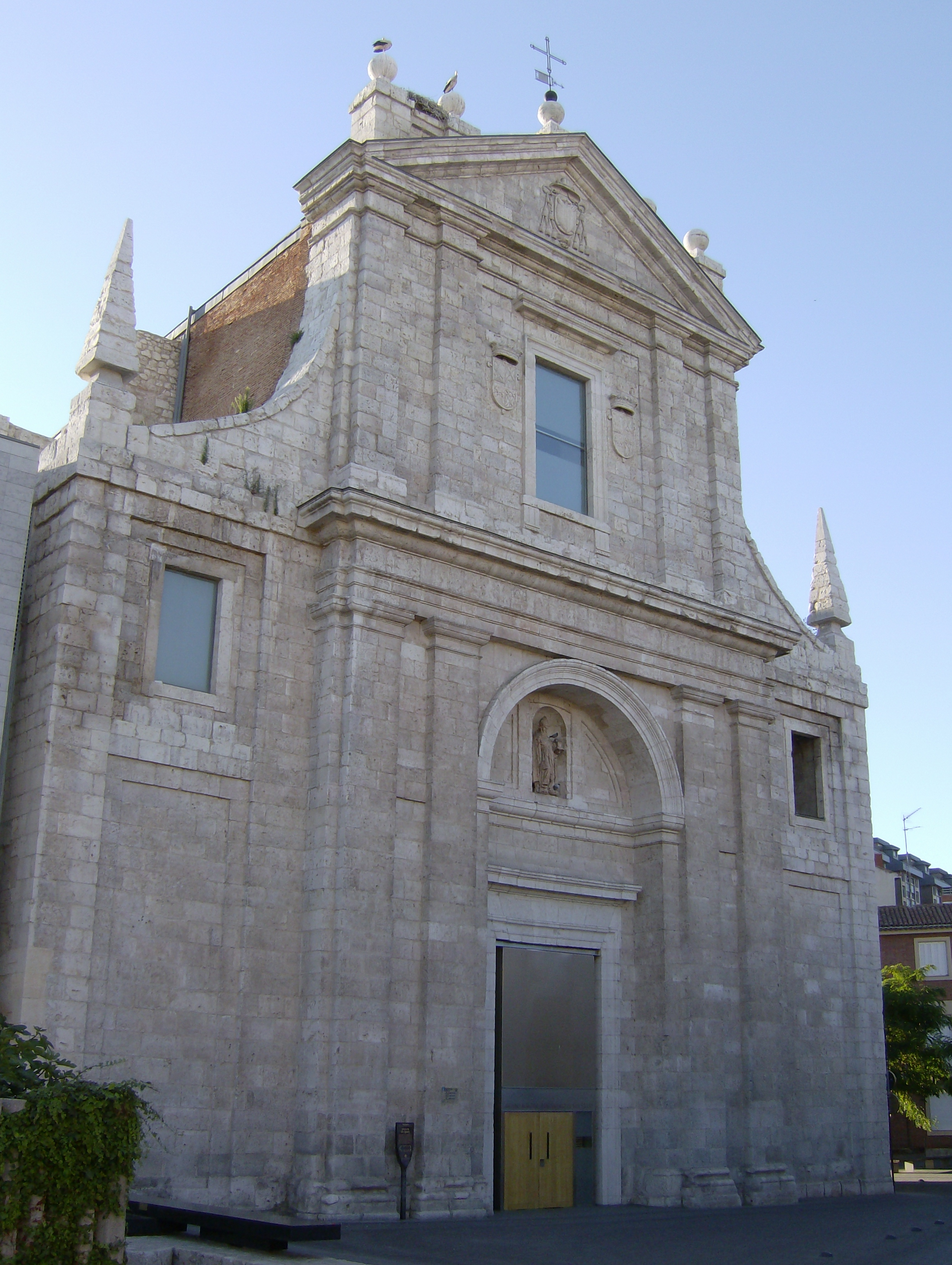 Iglesia de San Agustín (Valladolid)